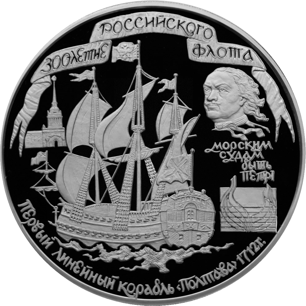 Монета Банка России — Серия: «Флот», 300-летие Российского флота, 100 рублей — Линкор «Полтава», реверс